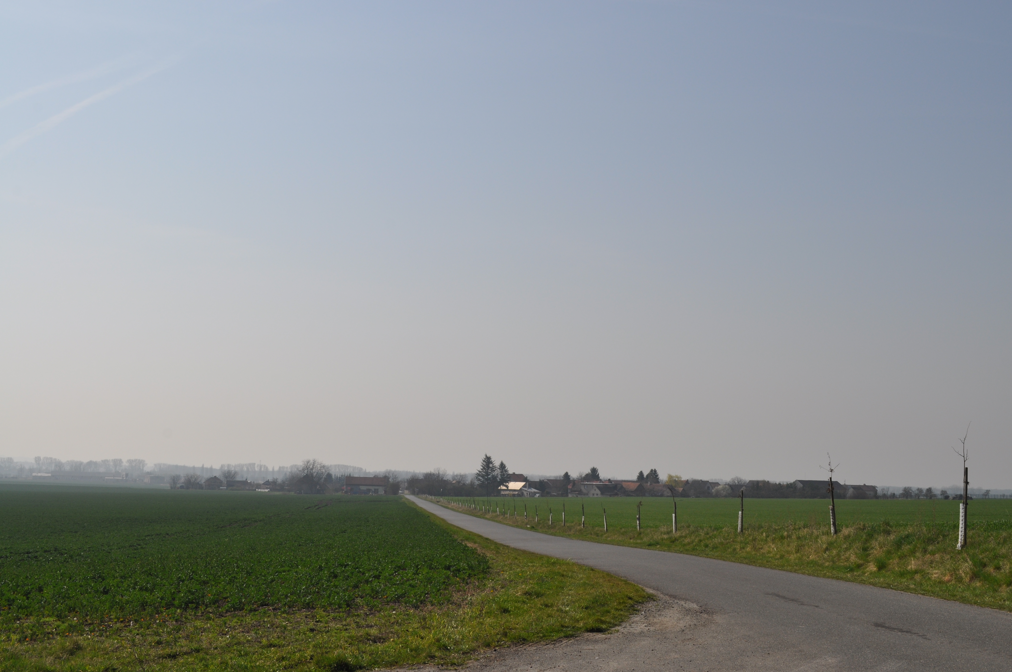 Strasse zur Ortschaft Oškobrh